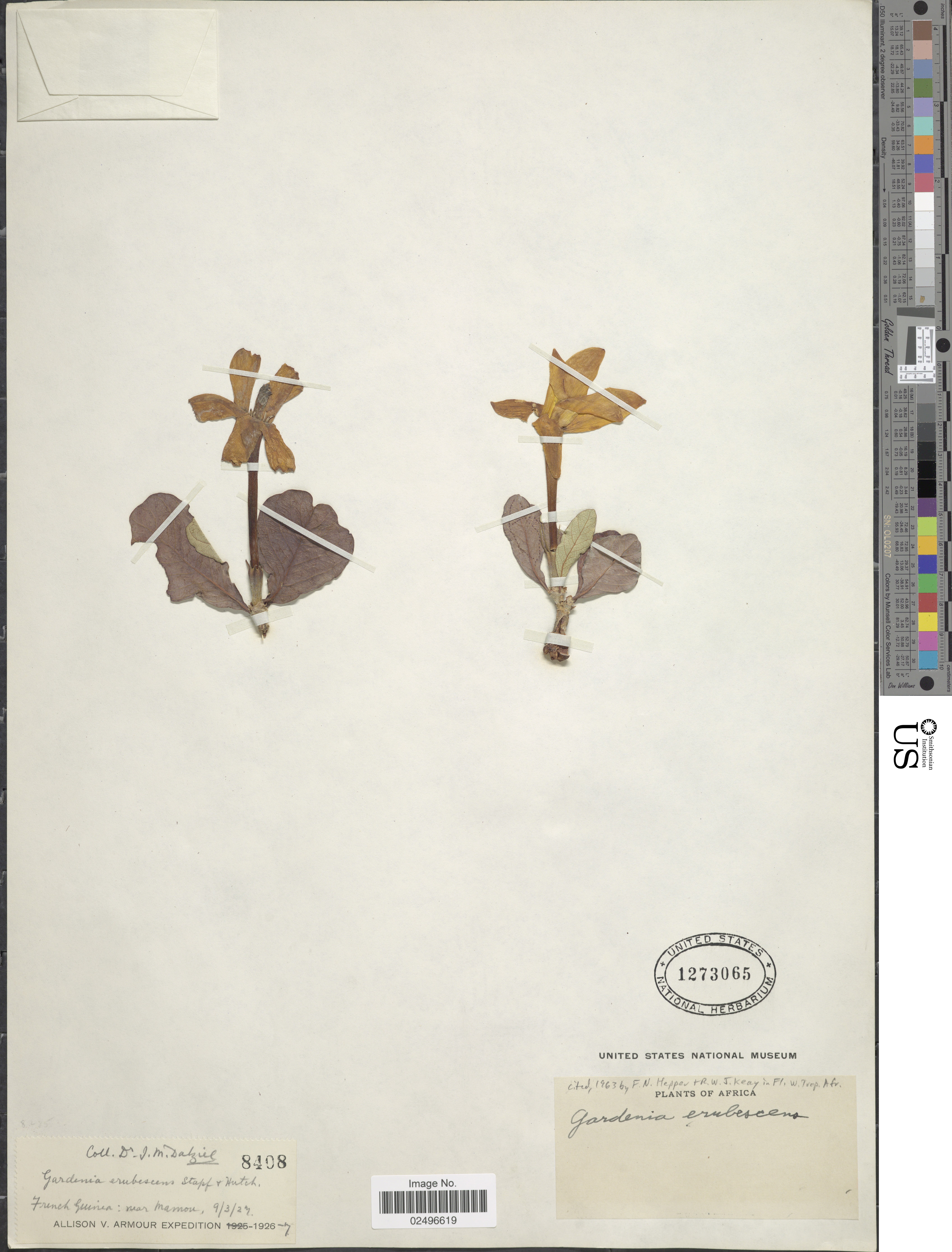 Gardenia erubescens Stapf & Hutch. Object Details Biogeographical Region 22 - West Tropical Africa Collector John McEwan Dalziel Record Last Modified 19 Dec 2017 Specimen Count 1 Collection Date 9 Mar 1927 Barcode 02496619 USNM Number 1273065 Place French Guinea: near Mamou, Mamou, Guinea, Africa Published Name Gardenia erubescens Stapf & Hutch. Taxonomy Plantae Dicotyledonae Rubiales Rubiaceae NMNH - Botany Dept. Record ID nmnhbotany_13710657 Usage of Metadata (Object Detail Text) CC0 GUID (Link to Original Record)